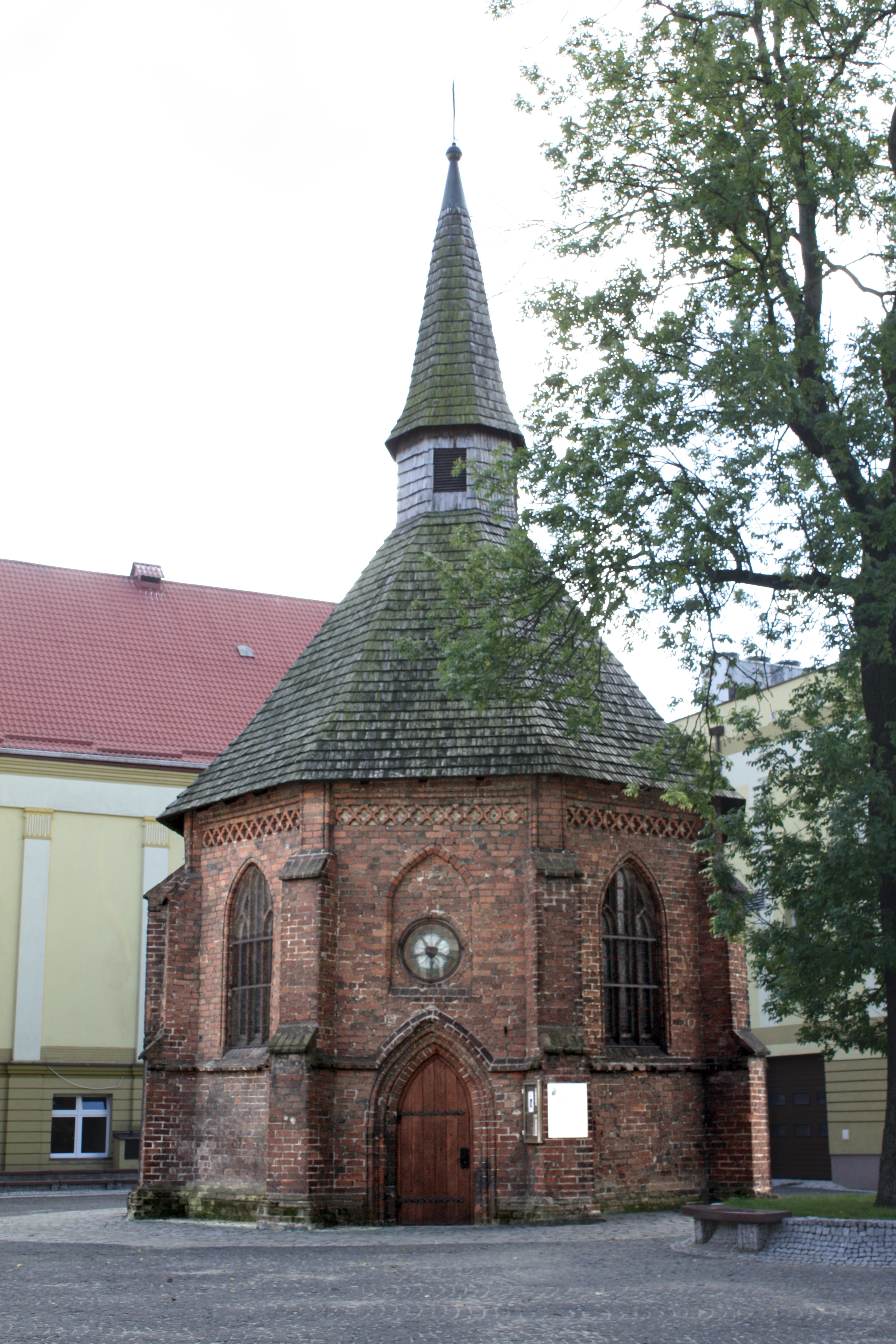 Kaplica p.w. św. Gertrudy przy ul.Modrzejewskiej w Koszalinie, XV